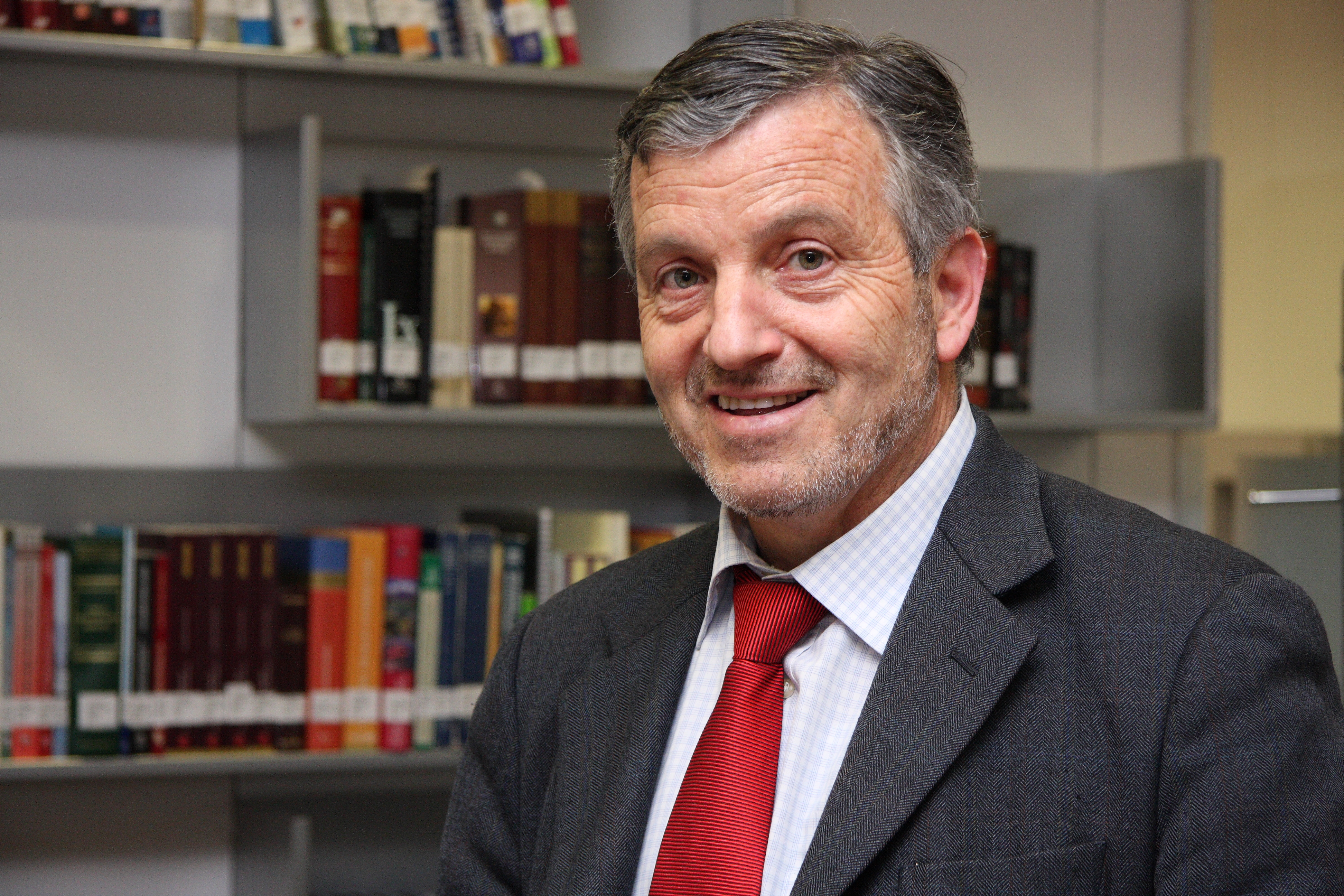 Antonio Horvath en el Congreso Nacional.